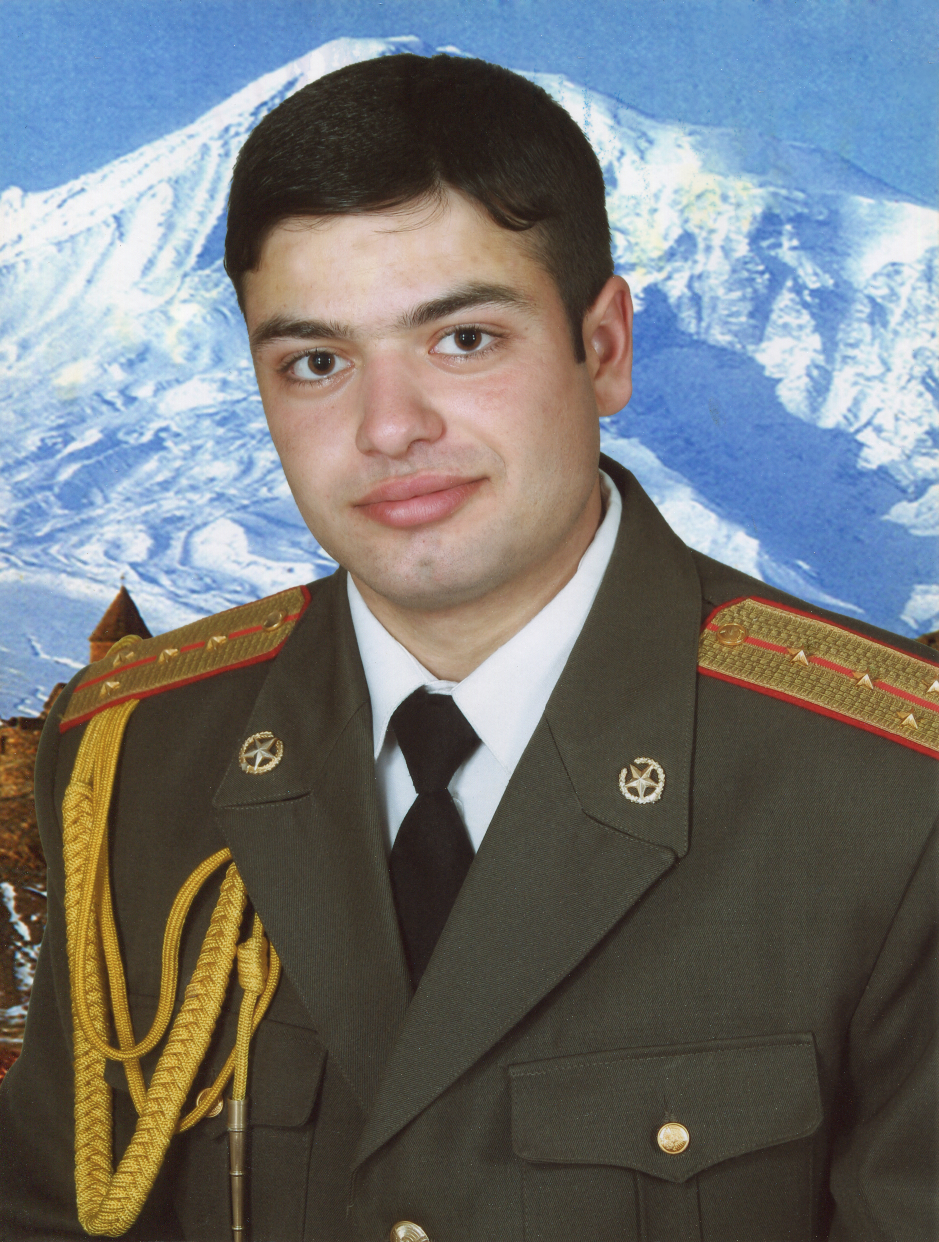 Զորիկ Ժիրայրի Գևորգյան